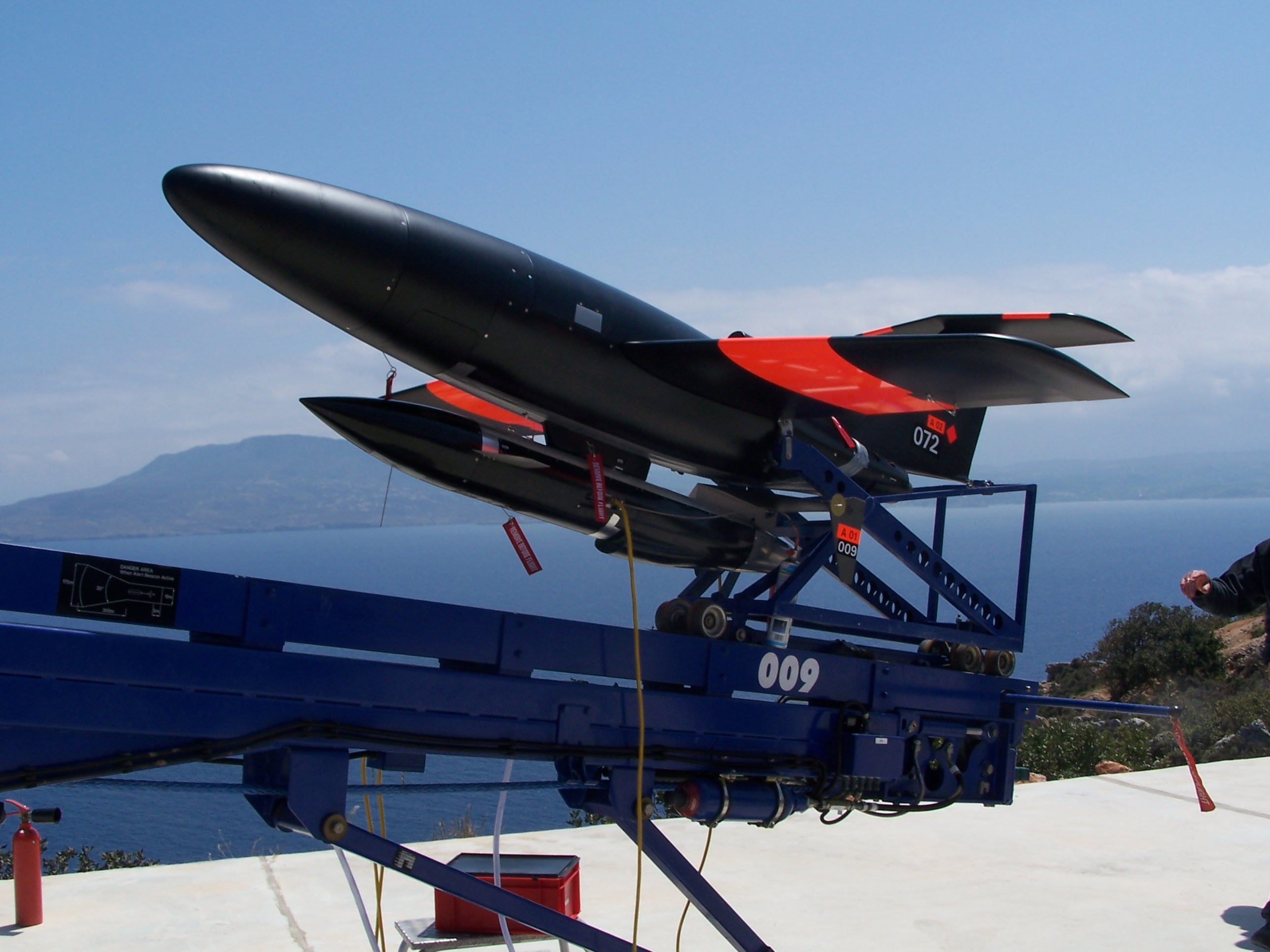 Das Bild zeigt eine Do-DT25 als Träger der Do-DT55 ARM